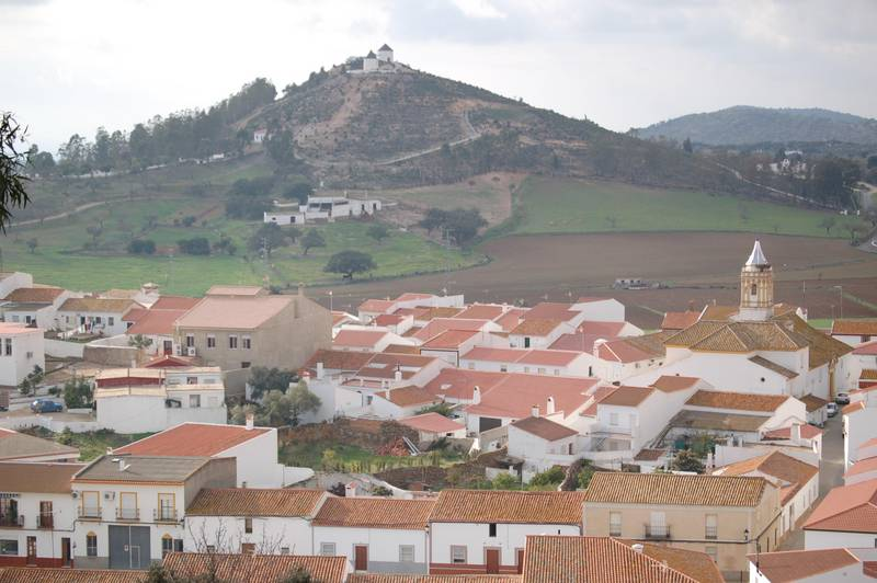 Vista panorámica de El Almendro, Huelva, España.